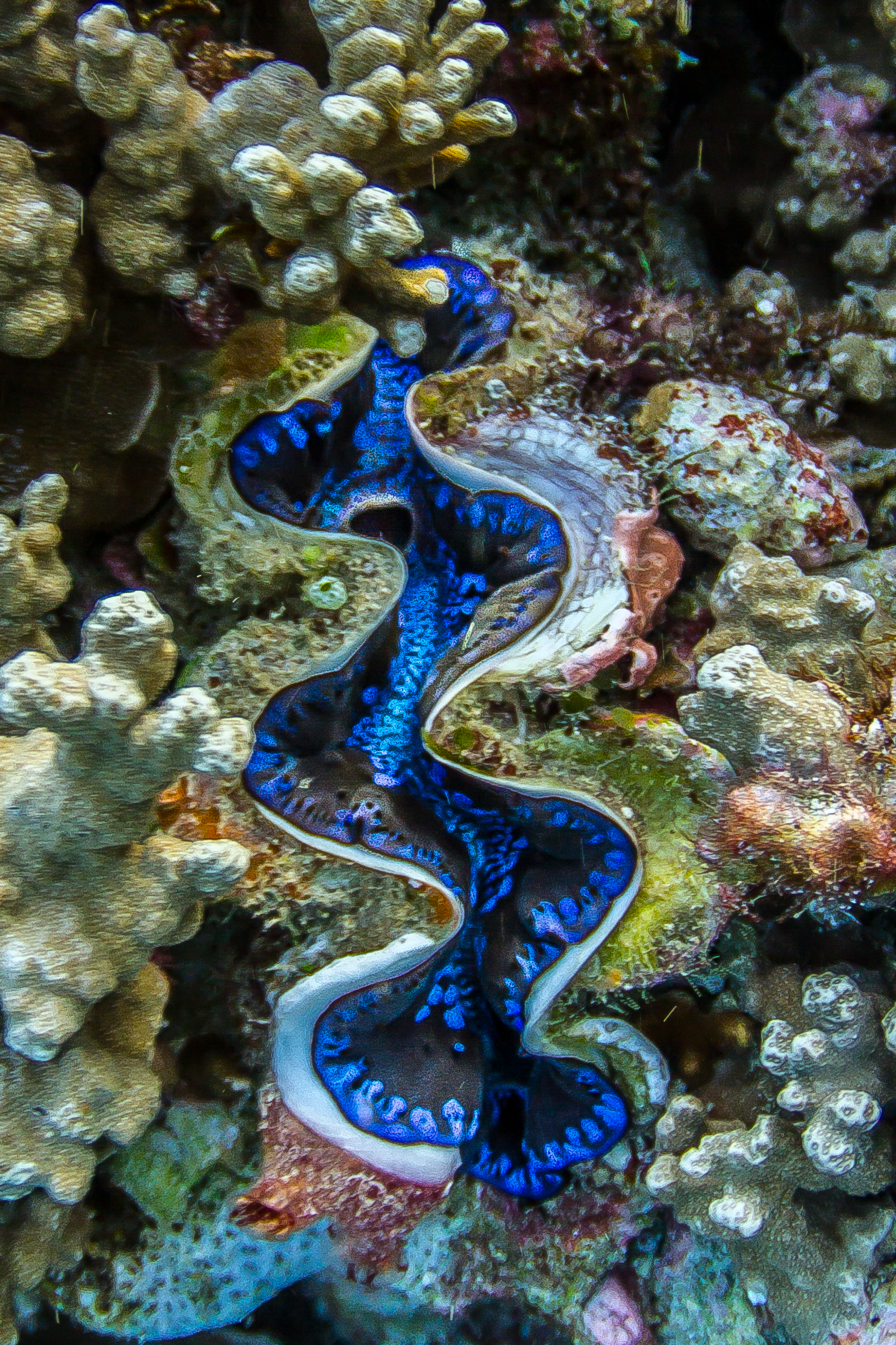 Giant Clam